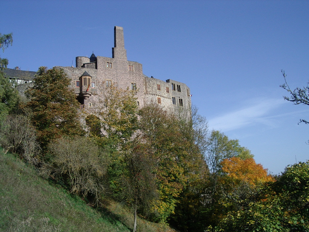 Schloss Oberstein